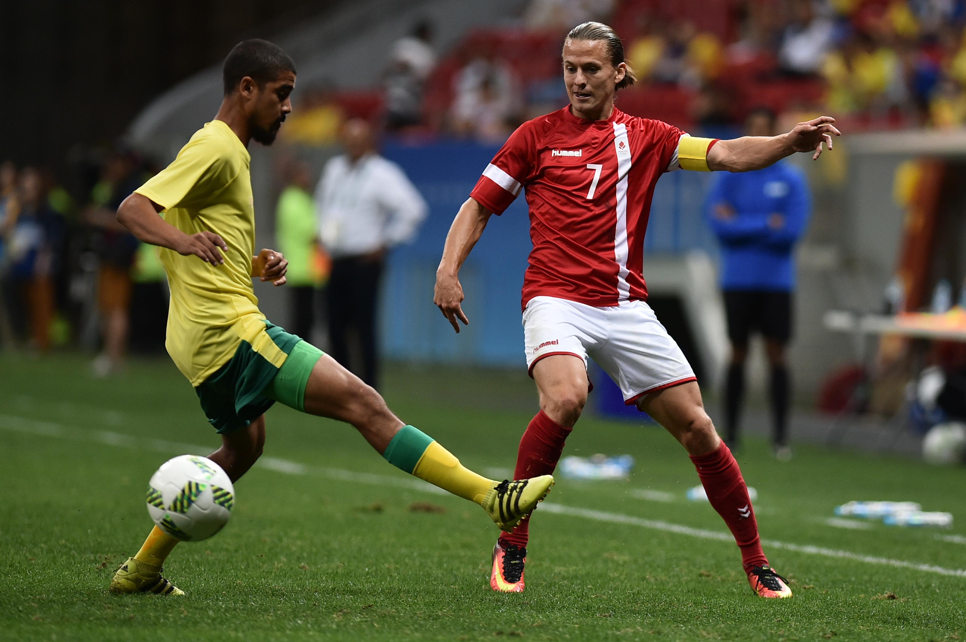 Estádio Nacional de Brasília Mané Garrincha, Brasília, DF, Brasil, 7/8/2016 Foto: Andre Borges/Agência Brasília. Dinamarca e África do Sul jogam neste domingo (7), no Estádio Mané Garrincha, pelo grupo A do futebol masculino nas Olimpíadas 2016. A Dinamarca venceu a África do Sul por 1x0, com gol de Robert Skov no segundo tempo.